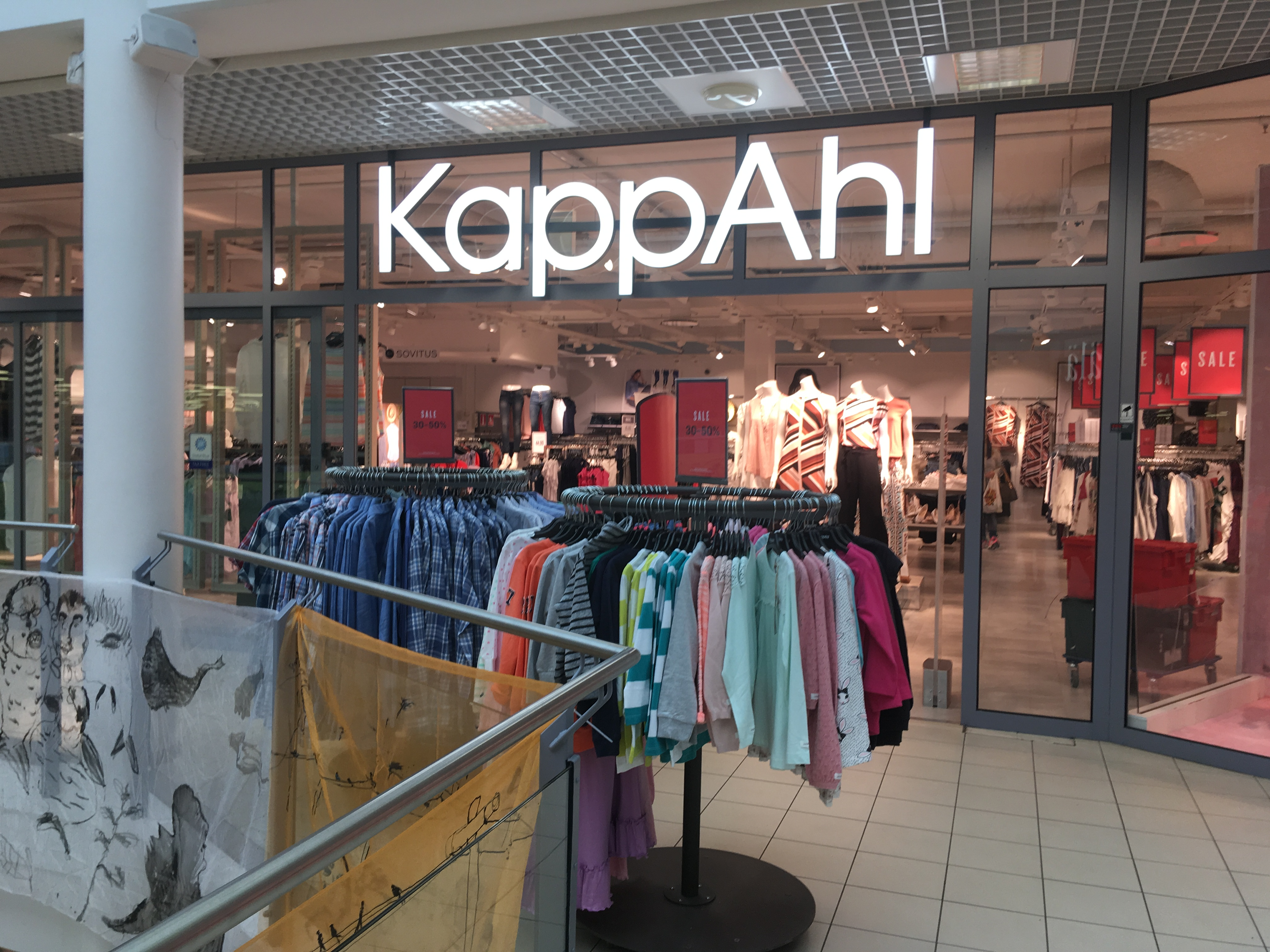 KappAhl-vaatekauppa kauppakeskus Lundissa, Porvoon keskustassa.